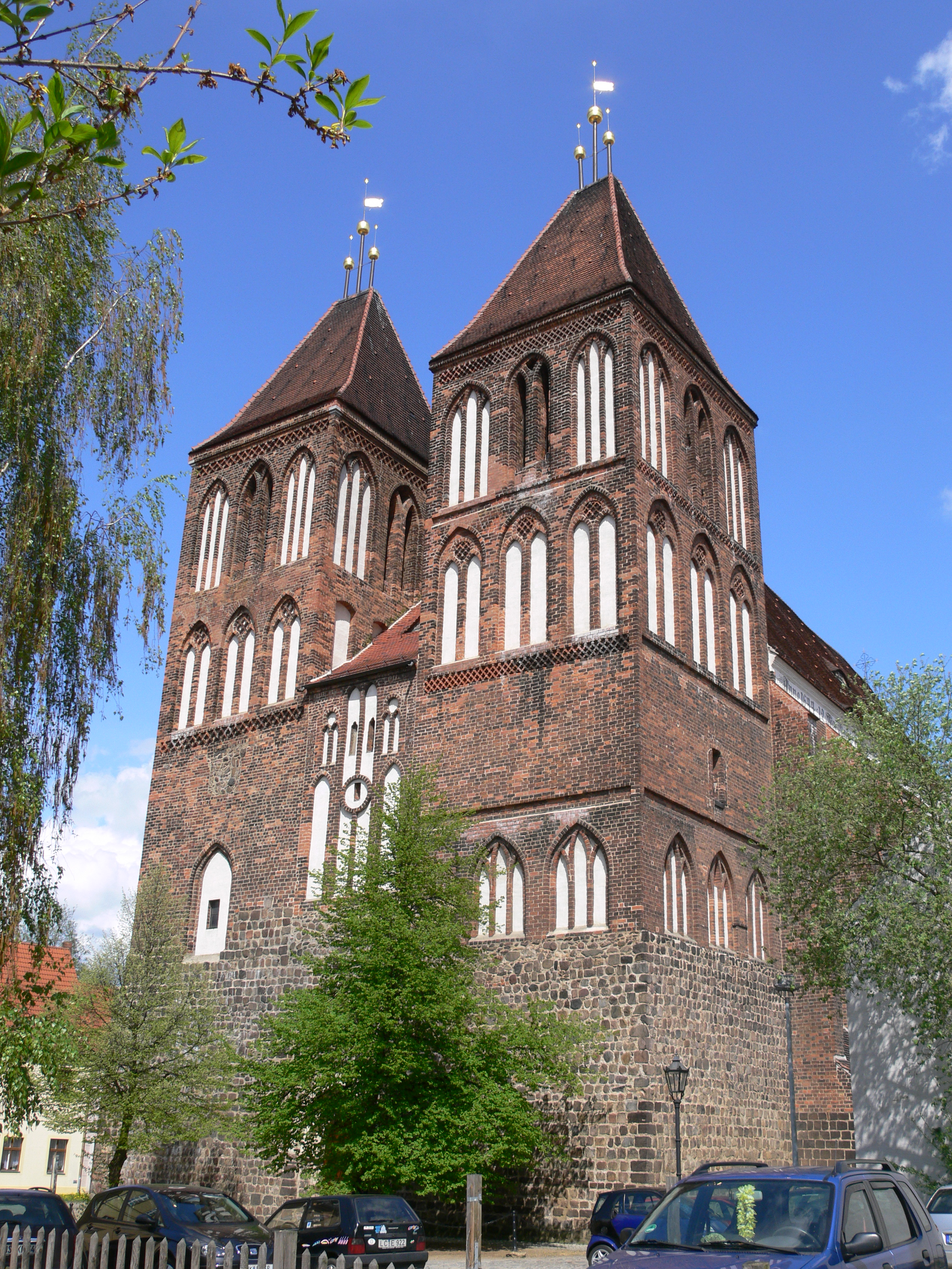 Luckau, Landkreis Dahme-Spreewald, Brandenburg St..-Nikolai-Kirche